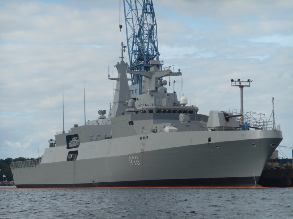 Frégate de classe Meko A-200 au port de Kiel en Allemagne, destinée à la Marine algérienne.